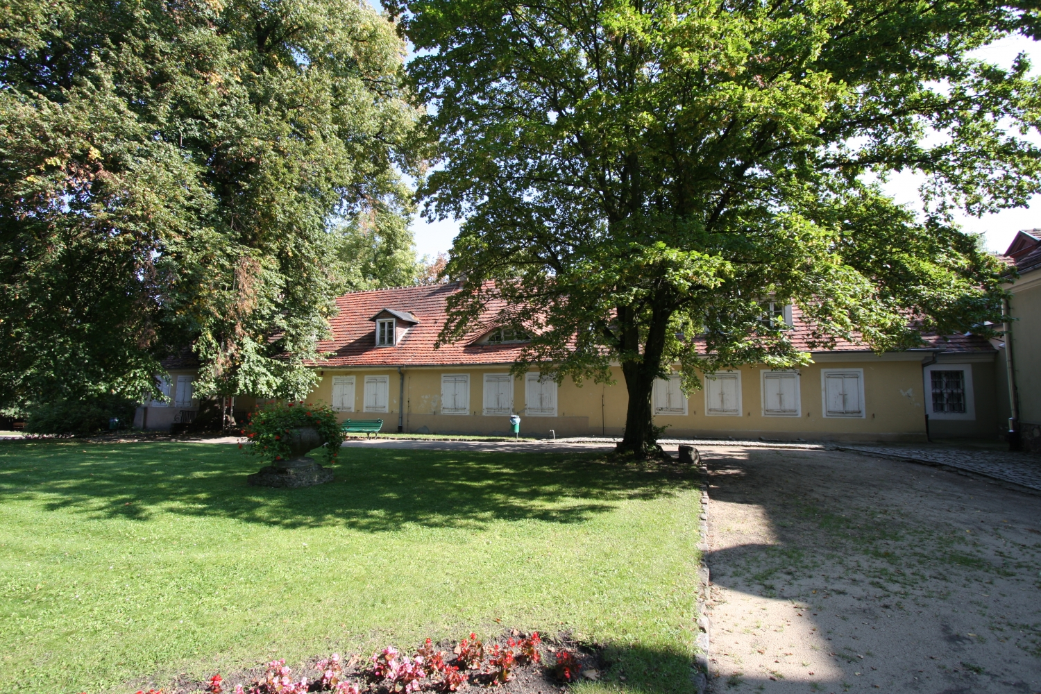 Międzyrzecz, oficyna, w zespole zamkowym, mur., XVIII w.